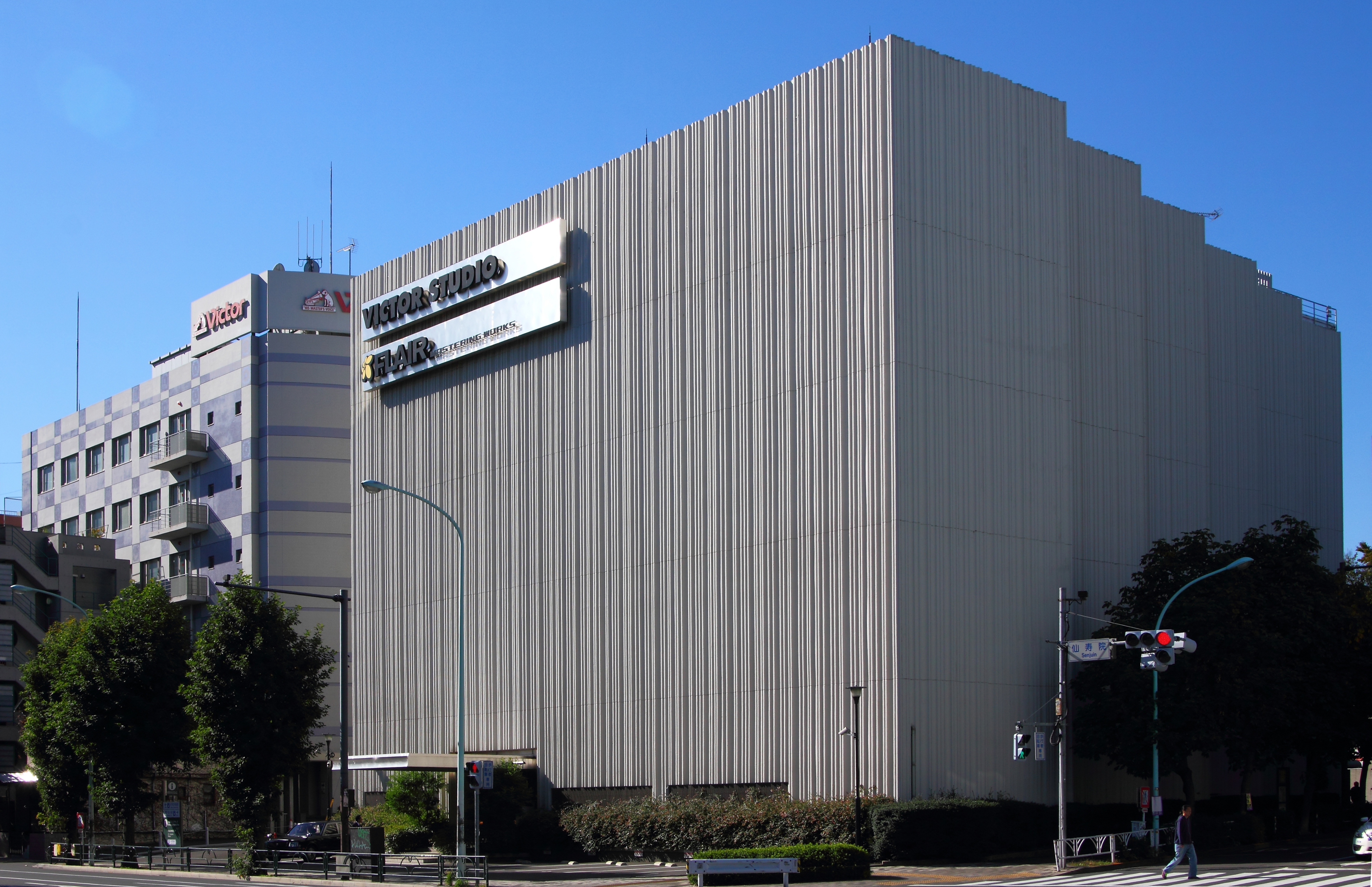 ビクタースタジオ＆JVCエンタテイメント本社（東京都渋谷区）